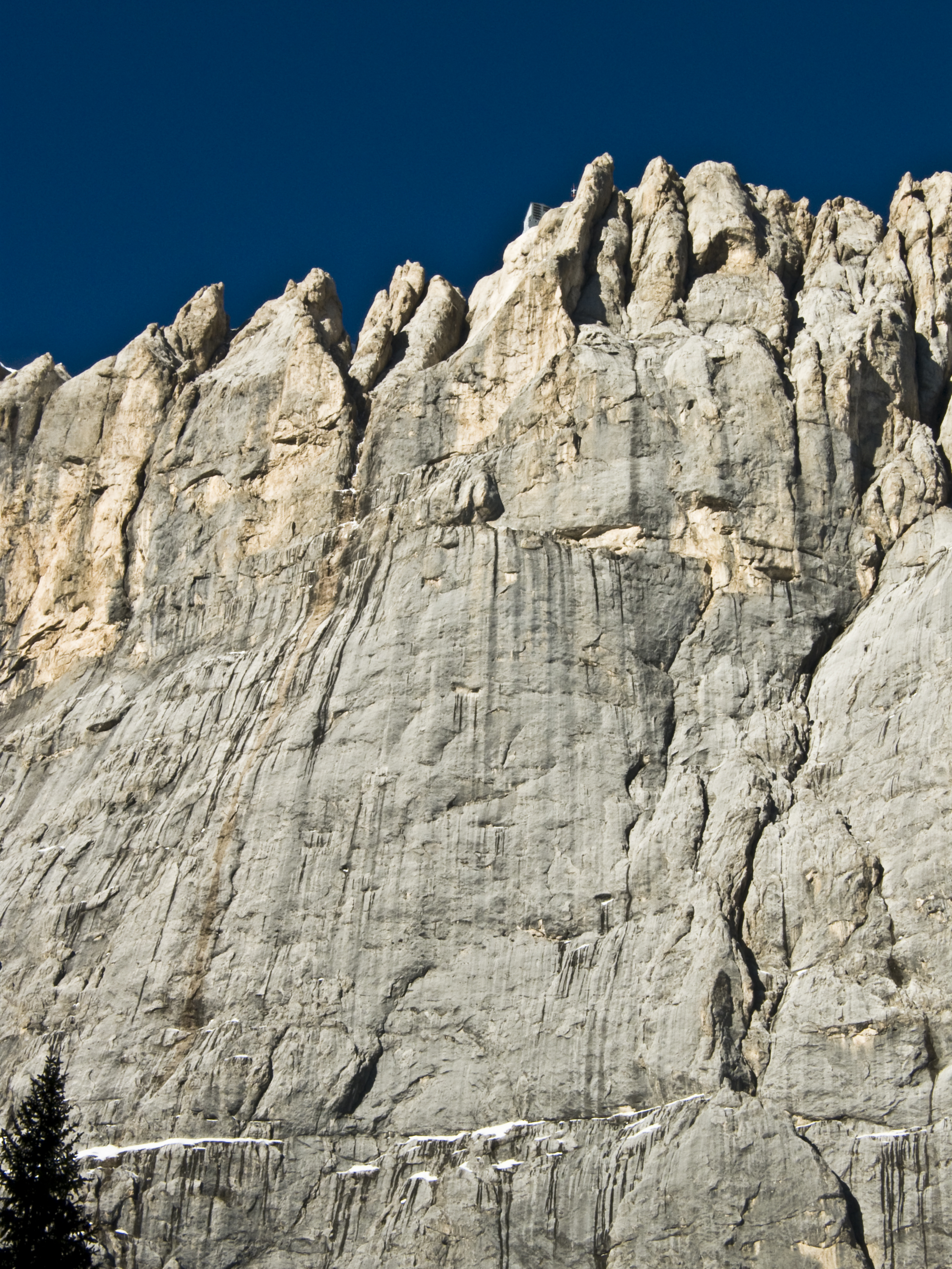 la cengia del pesce: cengia della omonima via "attraverso il pesce" aperta da Koller,Sustr dal 2 al 4/8/1981 - disl.920mt -svil. 1220mt (38 tiri) diff. 7b/r4/V ED+ - tempo 12/14 hr piu' o meno si sviluppa sulla verticale del pesce